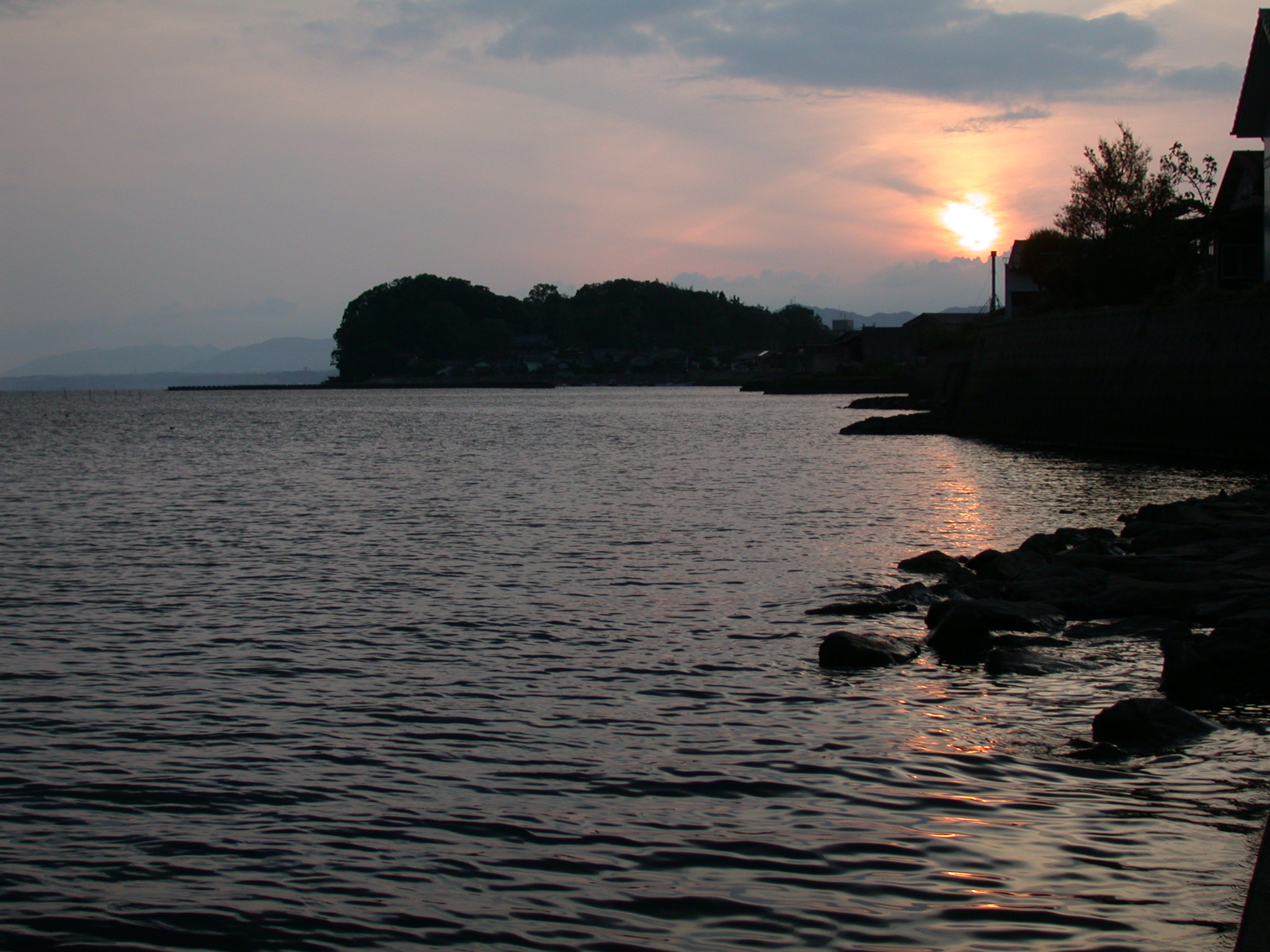 Manganji Castle